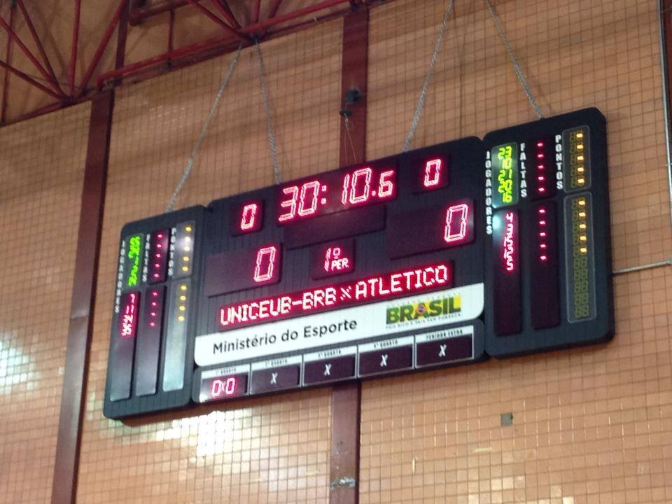 Novo placar eletrônico do Ginásio ASCEB, instalado para a temporada 2012/2013 com o apoio do Ministério do Esporte.